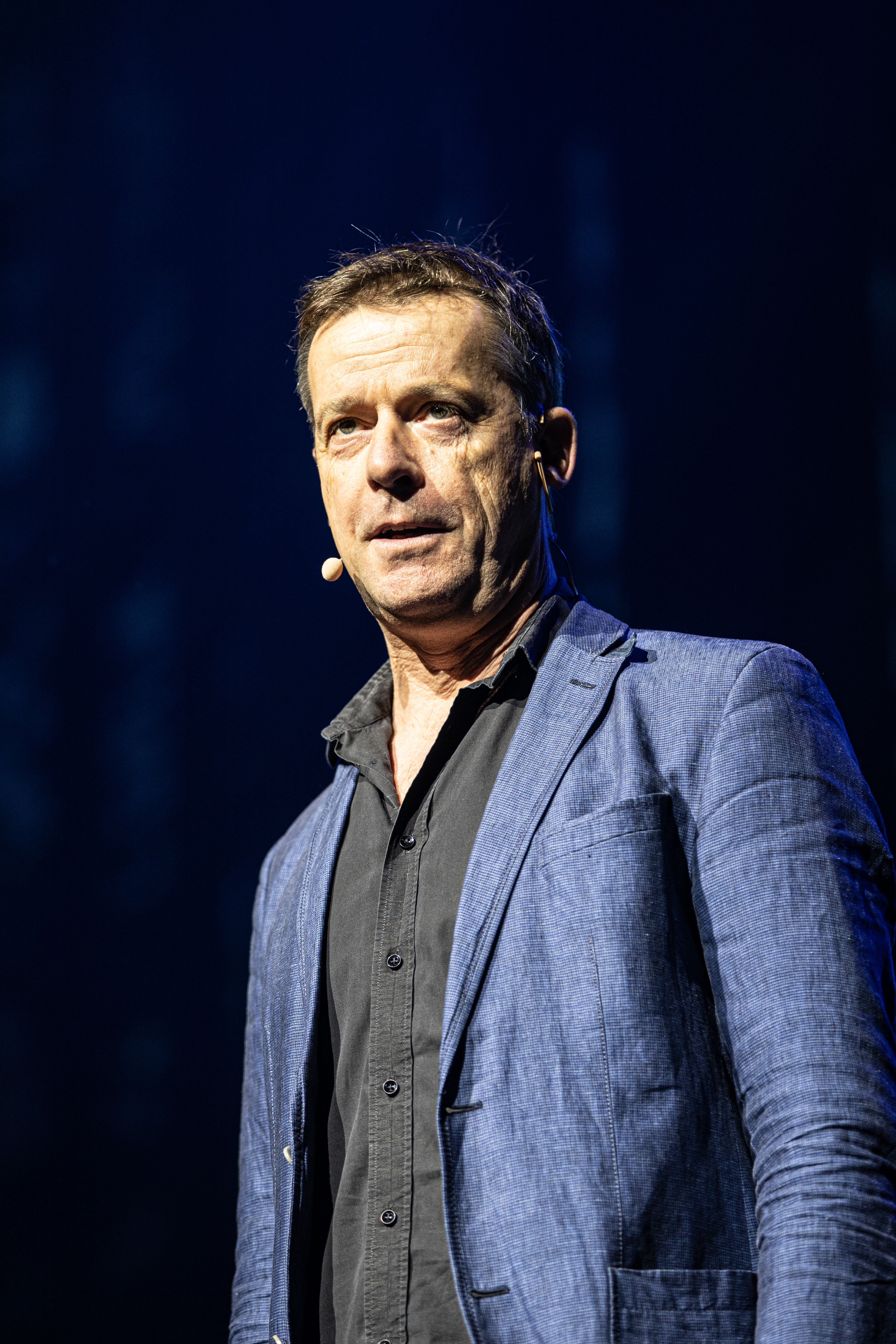 Der Schauspieler und Kabarettist Uli Boettcher auf der Internationalen Kulturbörse Freiburg 2020